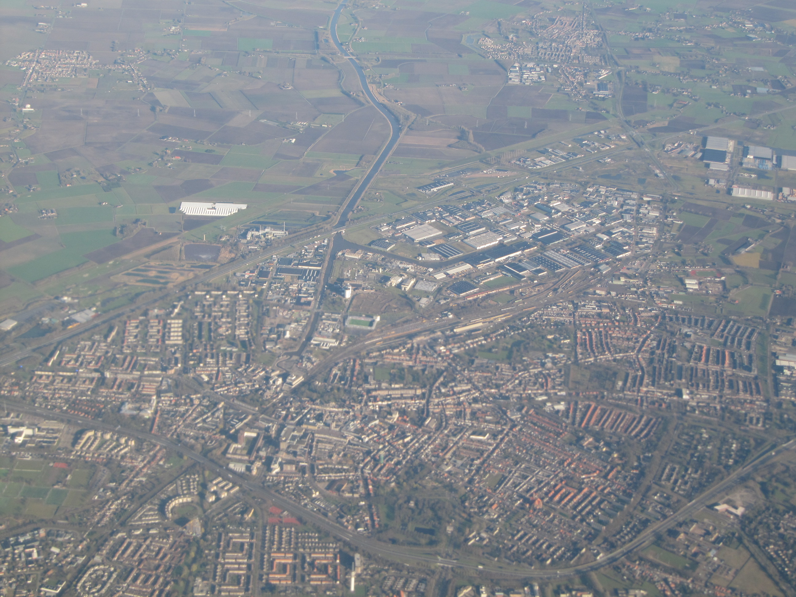 Mark-Vlietkanaal (Roosendaal)